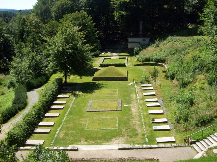 Foto der Gesamtansicht von der Gedenkstätte „Tal des Todes“, beim Konzentrationslager Flossenbürg; im Hintergrund das Krematorium, rechts auf dem Hügel das ehemalige Häftlingslager